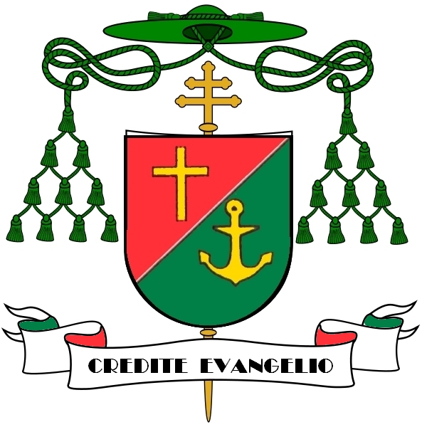 Wappen Tadeusz Goclowski *1931, Bischof/Erzbischof von Danzig (1984/1992-2008)